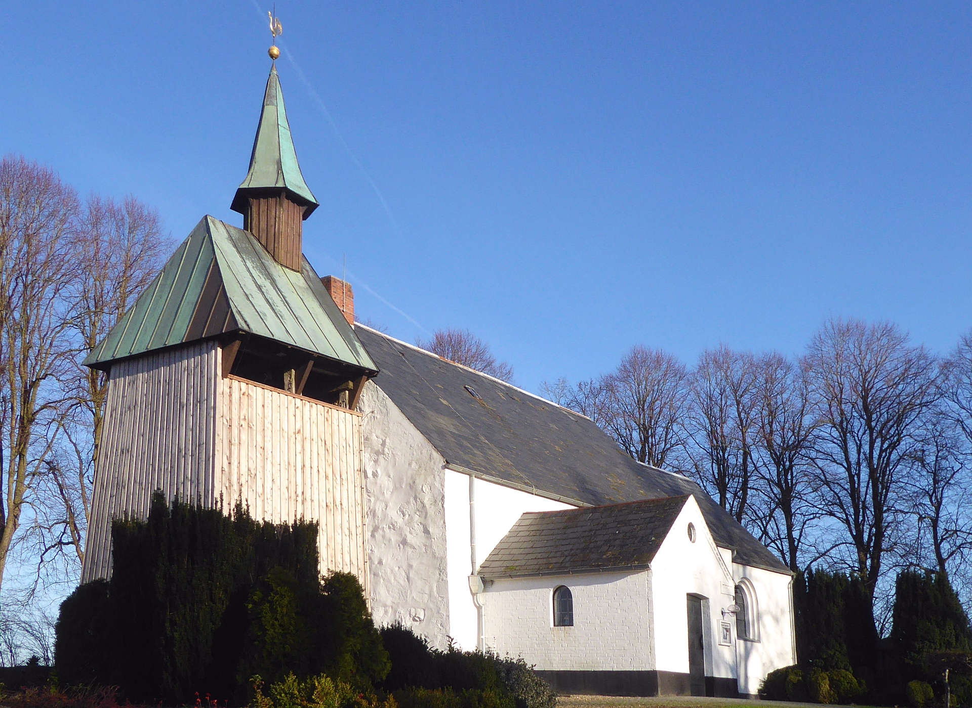 Taarstedt: die romanische St-Annen-Kirche als Feldsteinkirche mit Backsteinanbau ca aus 13. Jahrhundert - Foto 2018 Wolfgang Pehlemann DSC04279